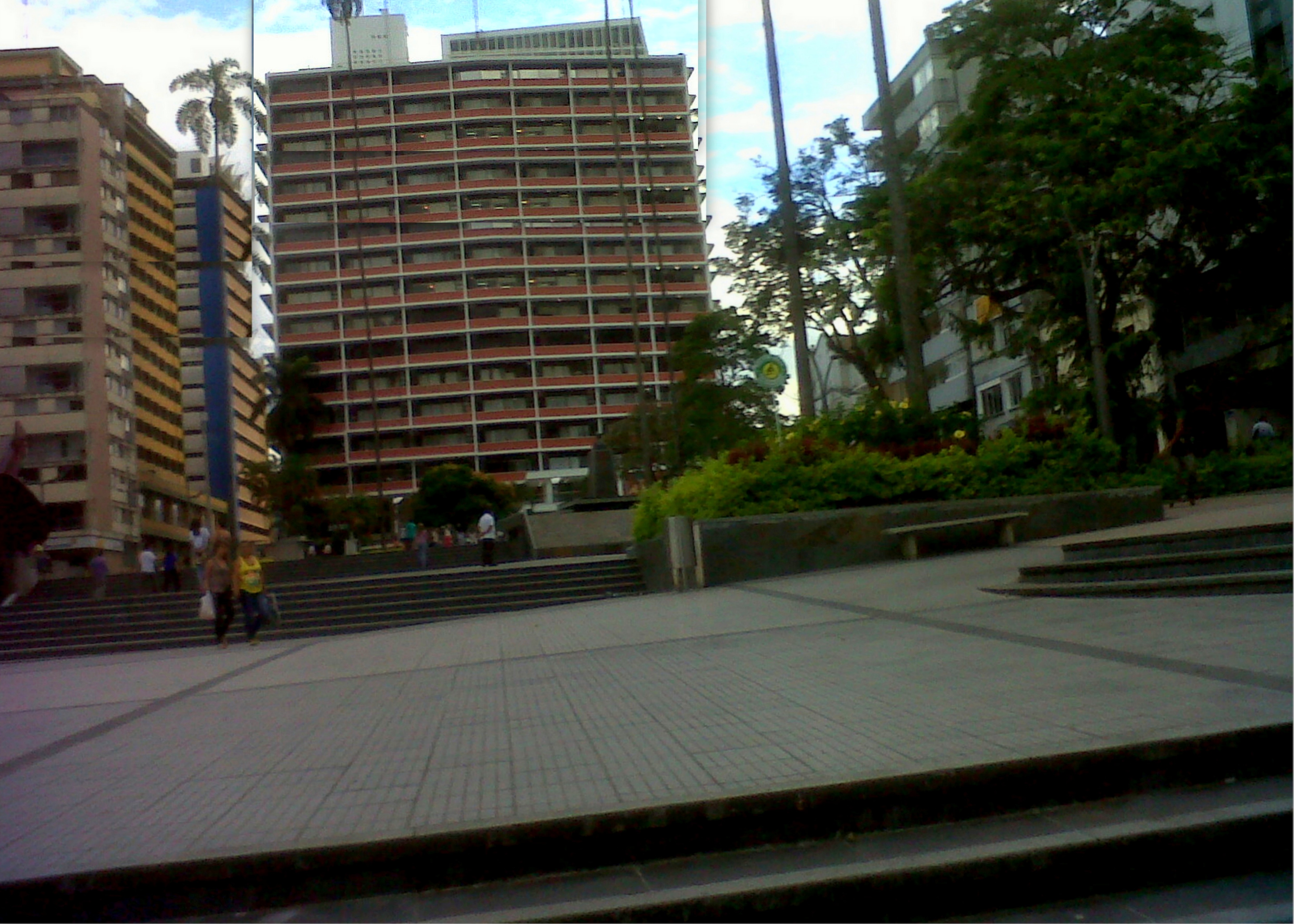 parque en Ibague, al frente gobernacio del Tolima